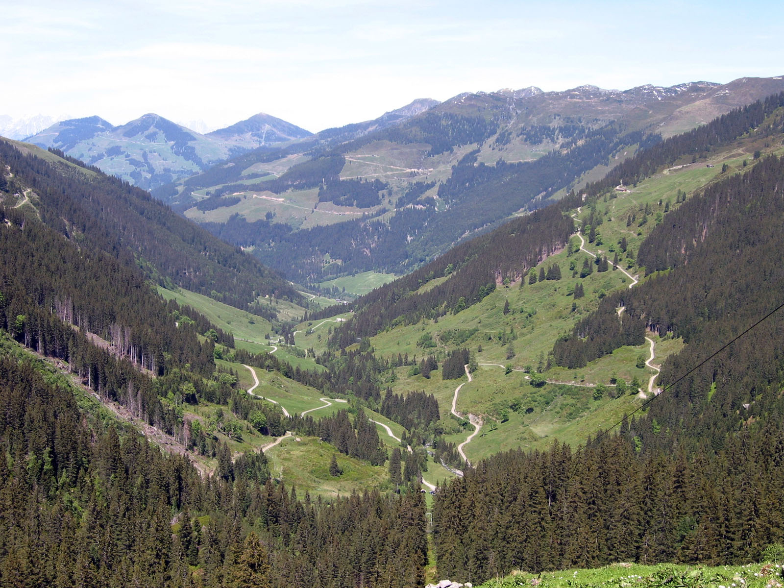 Windautal, talauswärts (Richtung Norden) (Standpunkt: Rotwandalm)